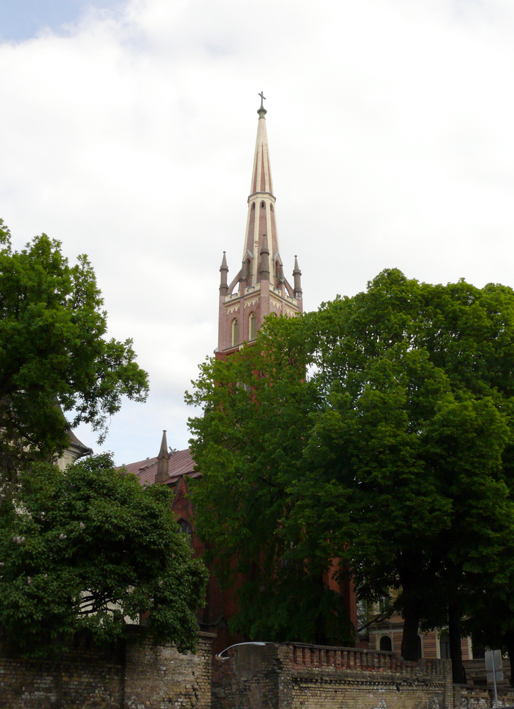 Anglikāņu Sv. Pestītāja baznīcas ēka Rīgā (uzcelta 1859. gadā).